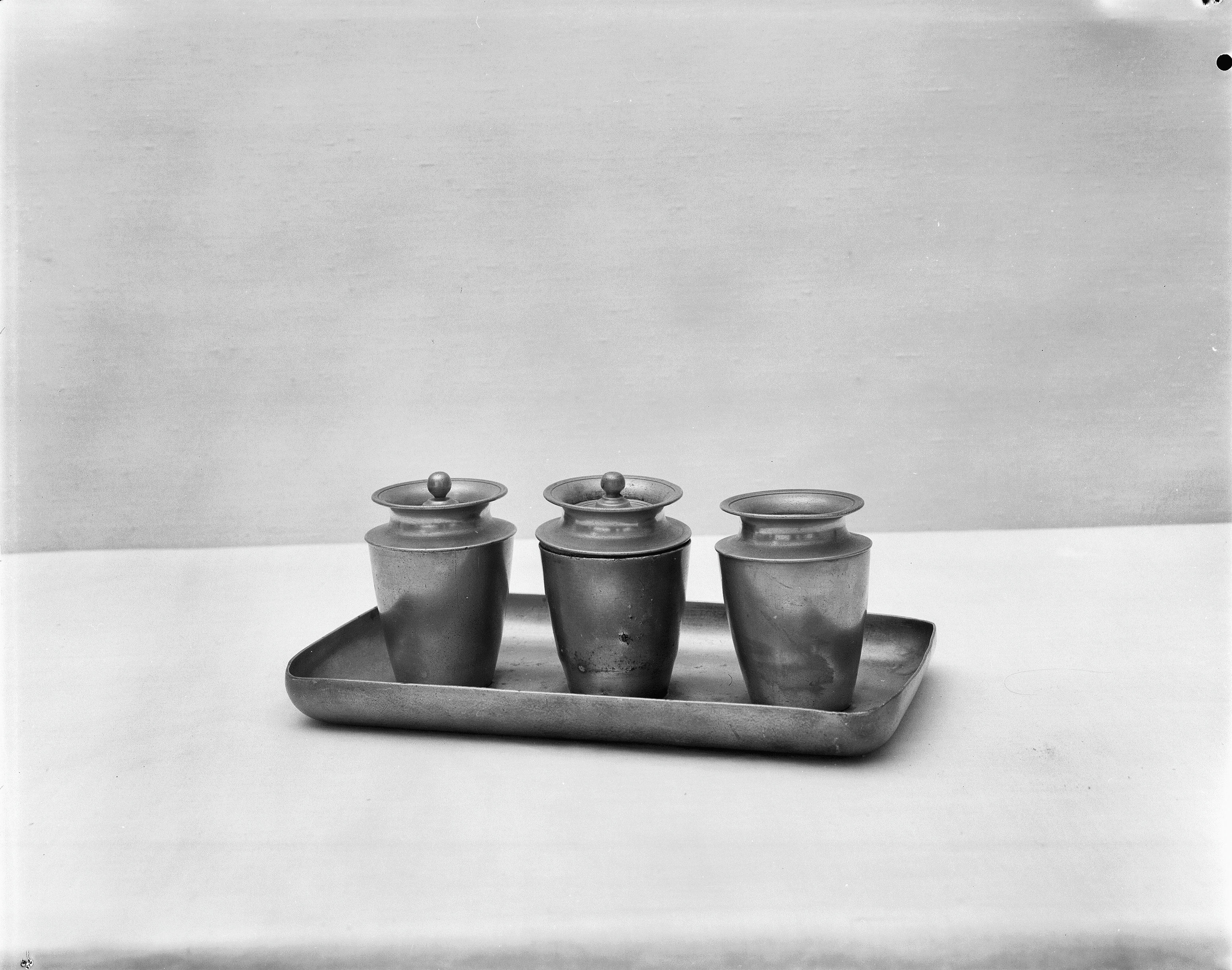 R.K. Jongensweeshuis: tinnen inktstel thans in Amstelstad